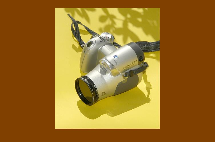 Foto göran olofsson/ Stefan Linder Det är min kamera och jag arrangerade fptot göran olofson som är en kompis till mig tryckte av bilden. Han sa att han inte ville upphovrättskydda denna bild och det var ok att publisera som wikipedia. Nåväl sedan sände han bilderna till mig och jag beslöt att lägga brun ram runt denna bild. Jag beställde sålunda bilden för Wikipedias räkning Minolta Z20